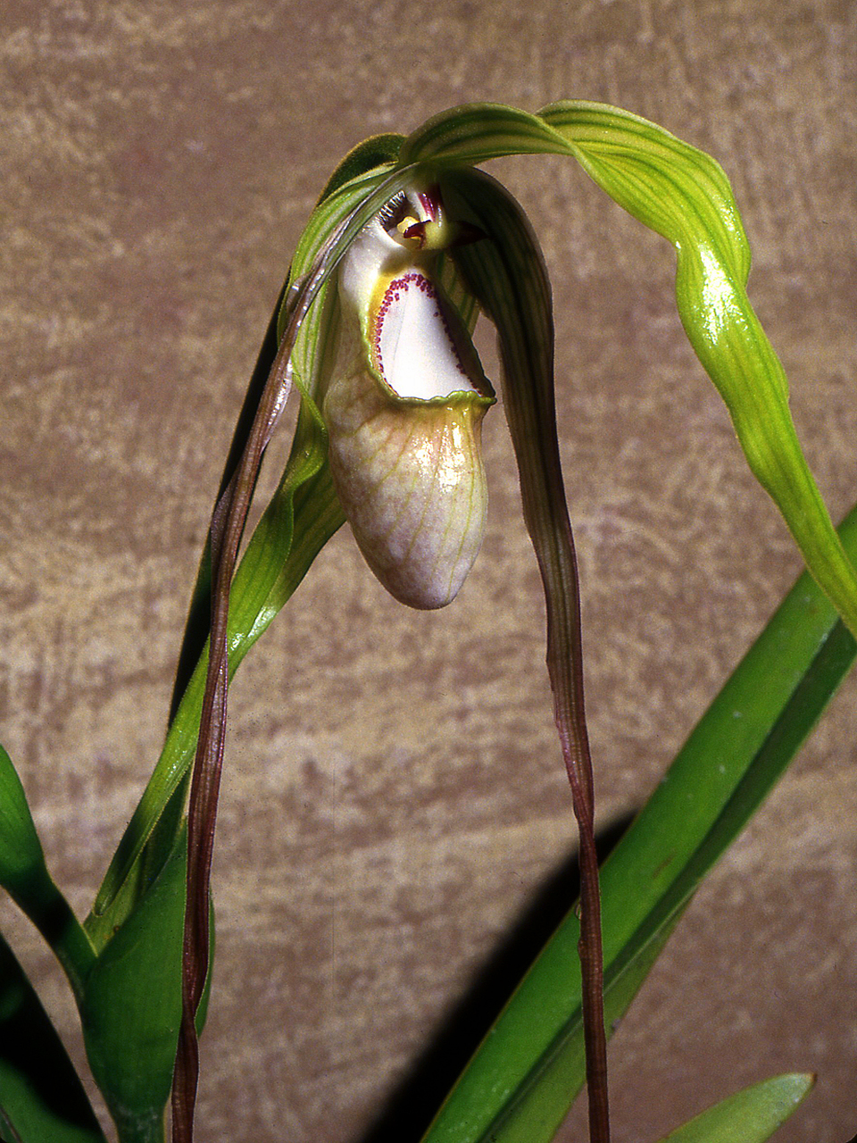 Phragmipedium warszewiczianum - flower